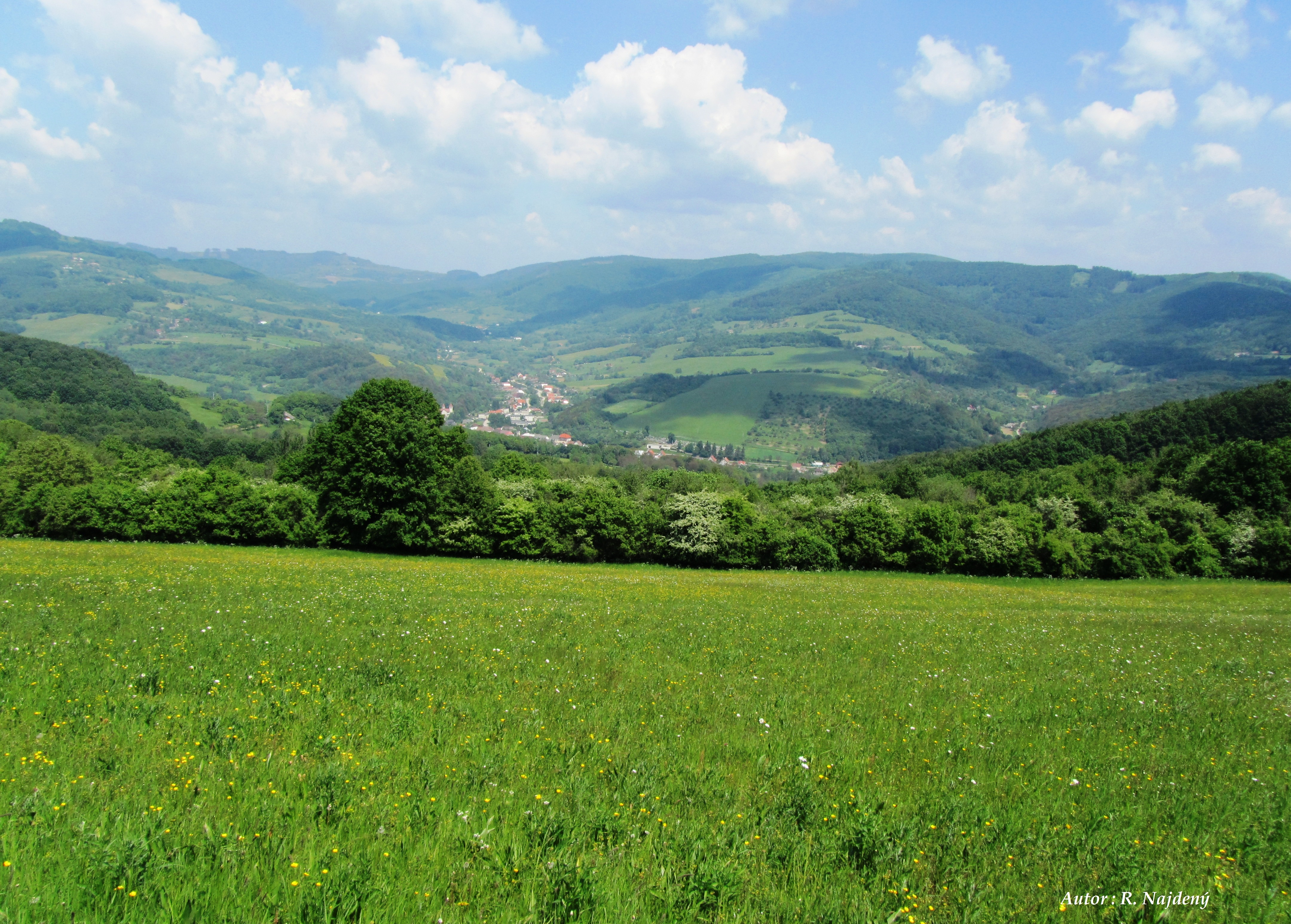 Pohľad na obec Nová Bošáca